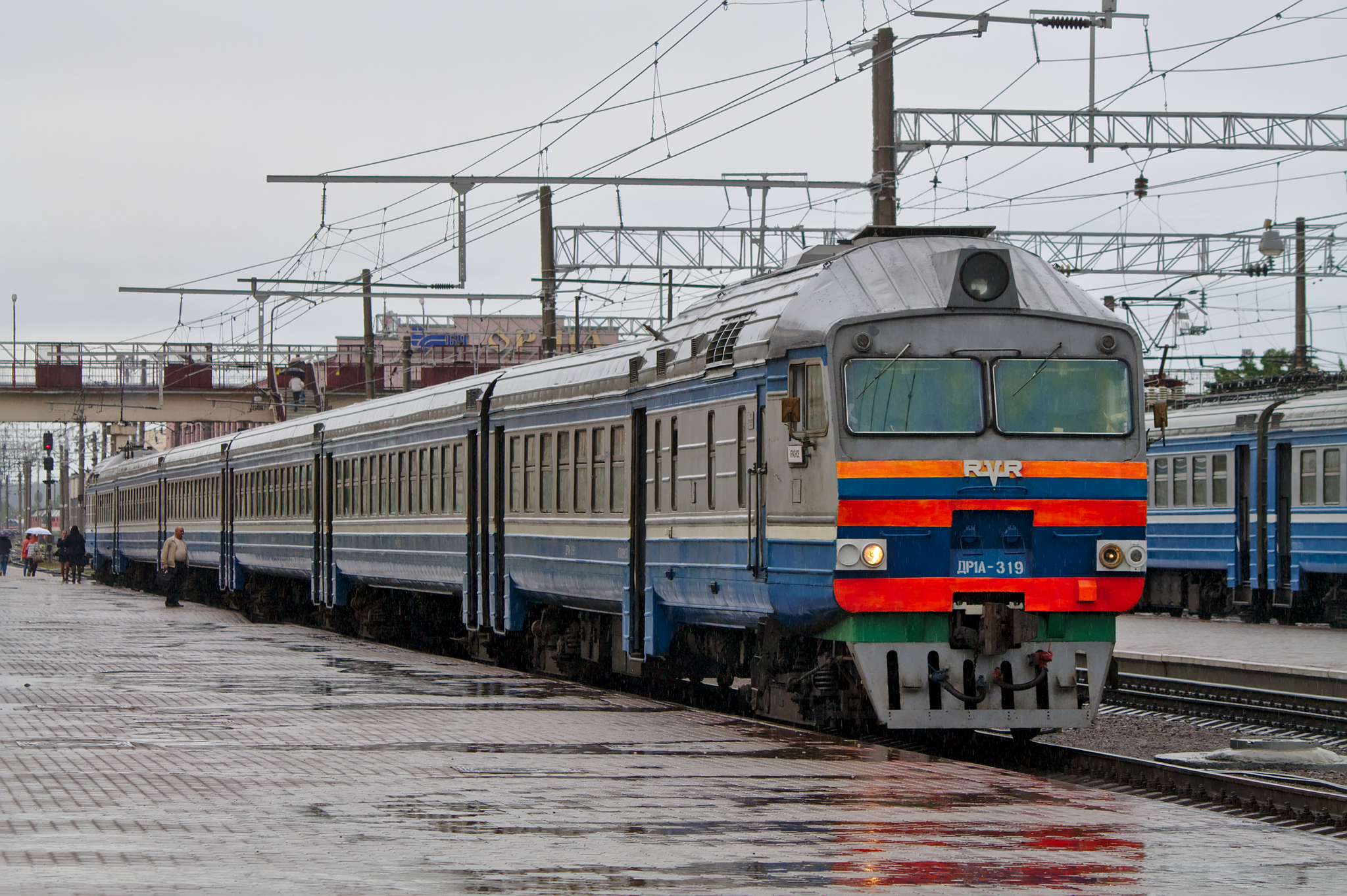 ДР1А-319, Орша-центральная. см. фото 601680 в альбоме автора